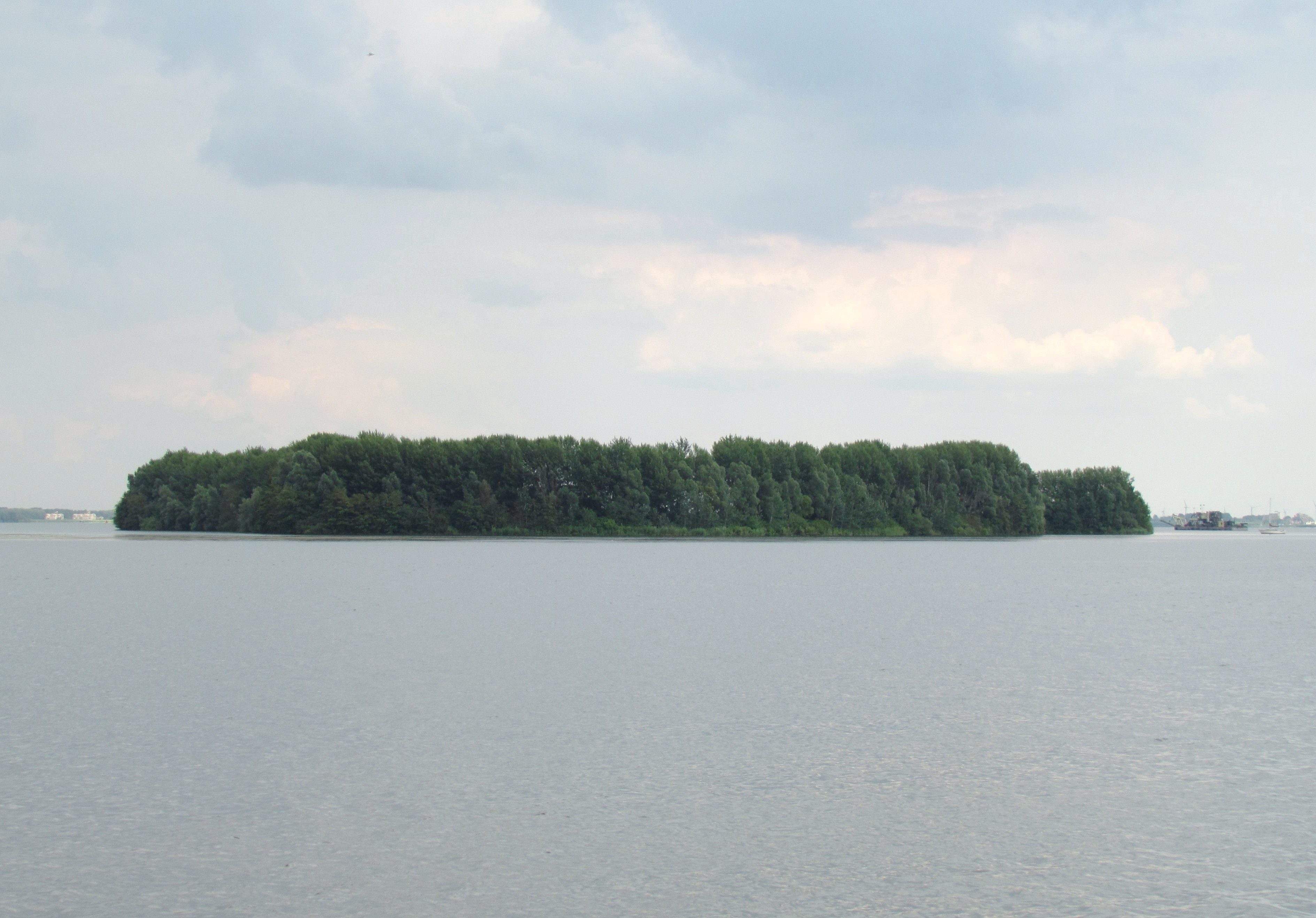 De Schelp, kunstmatig eiland in het Gooimeer, voor de kust van Naarderbos